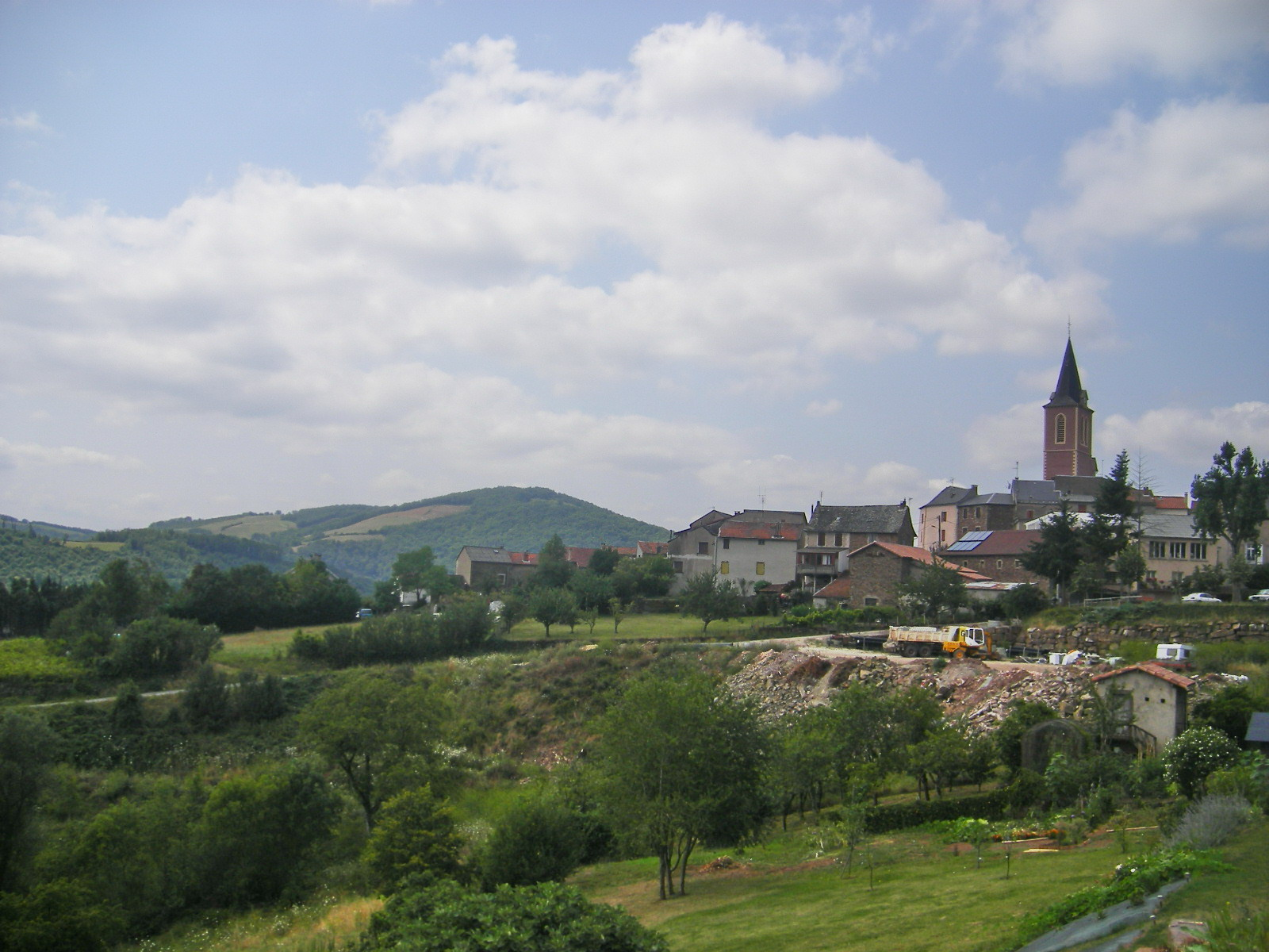 Broquiès